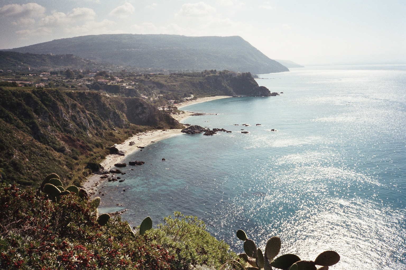 Blick vom Capo Vaticano (Calabria) nach Südost